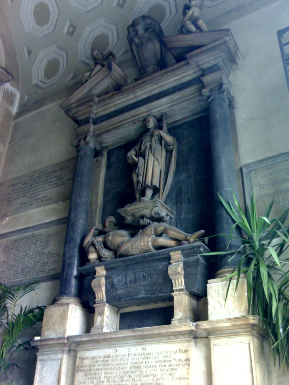 Monumento funebre a Ferdinando Maiorca posto all'ingresso della Pontificia Reale Basilica di San Giacomo degli Spagnoli (Napoli)